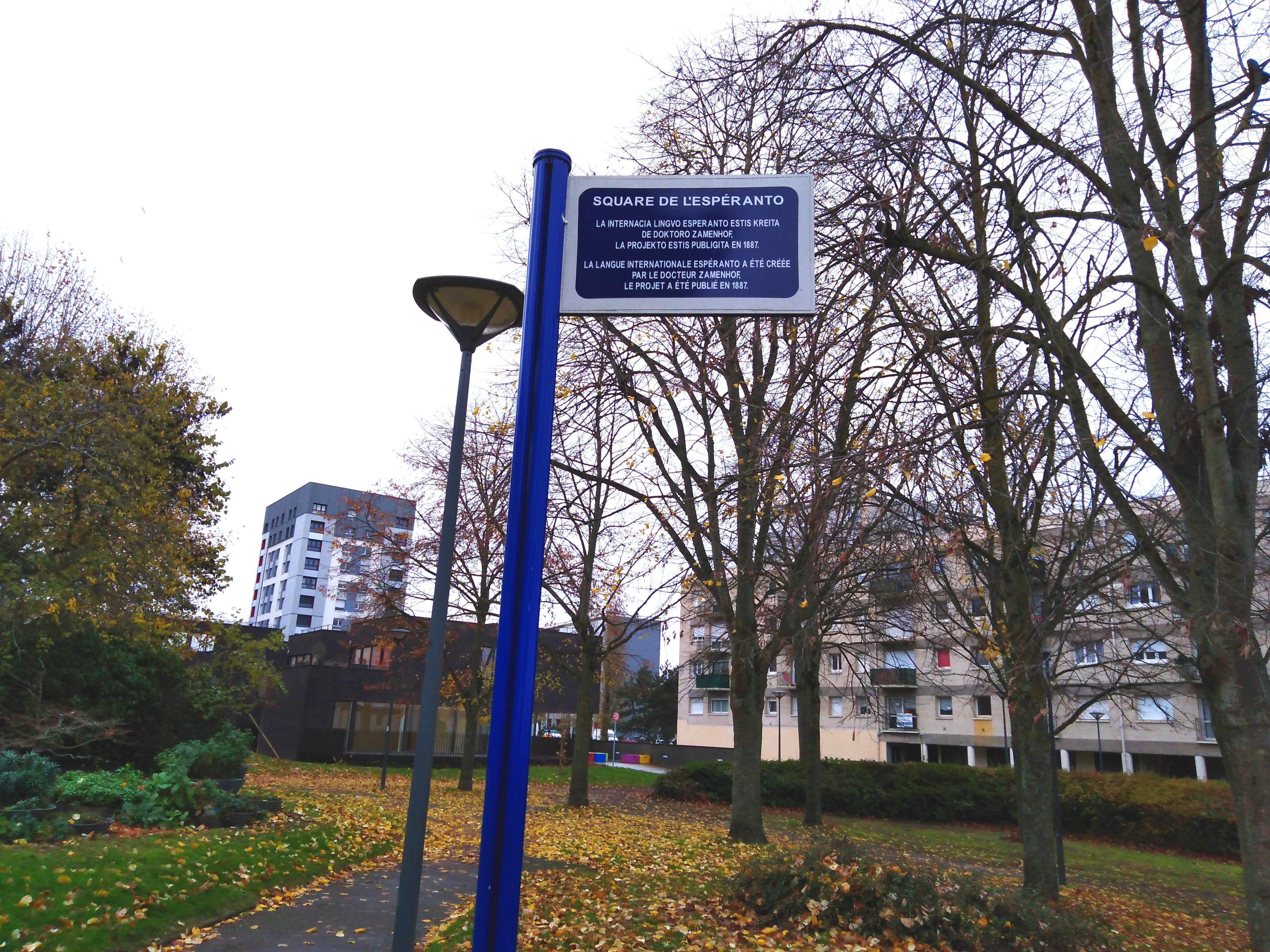 Skvaro de Esperanto en Hérouville-Saint-Clair